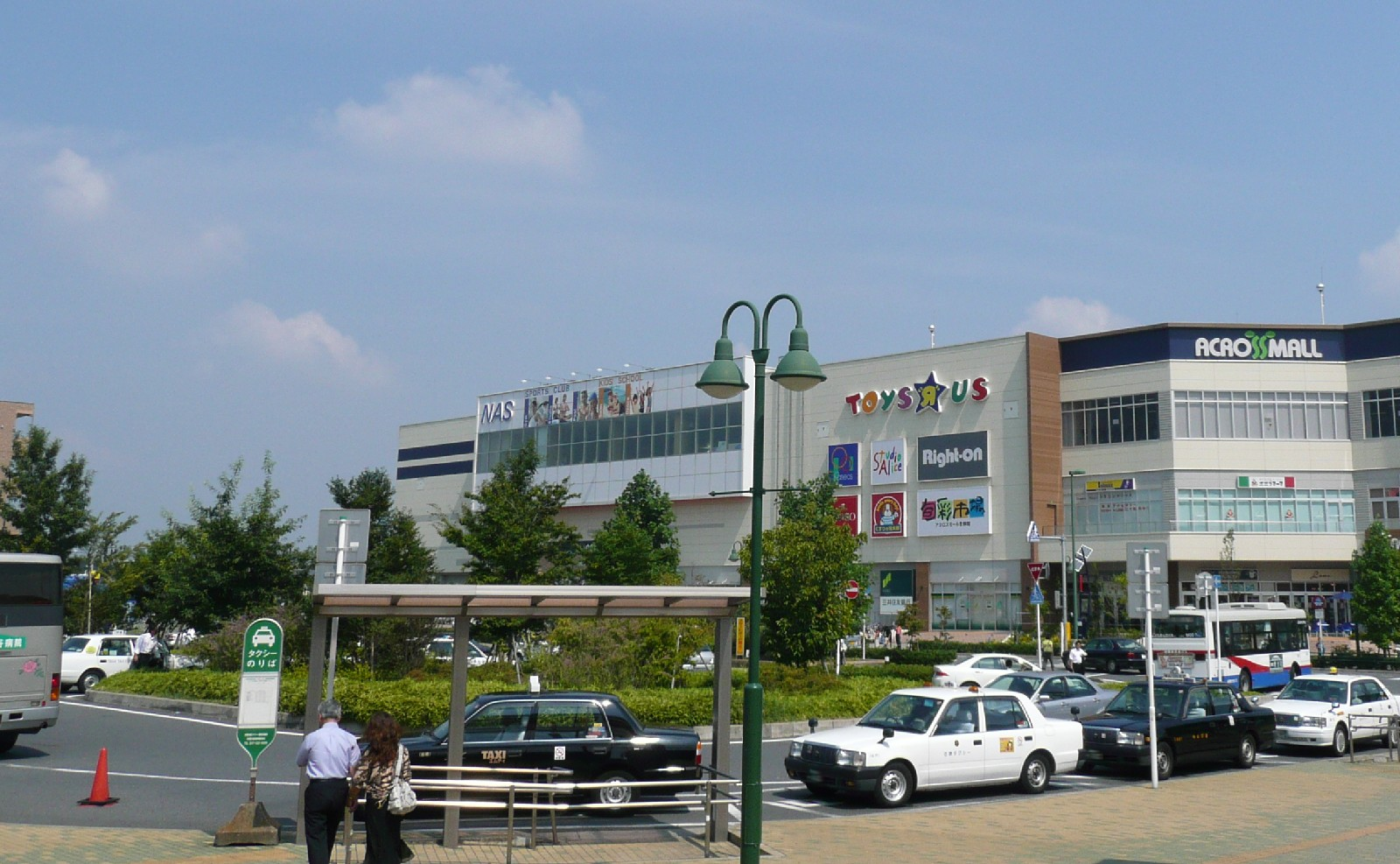 新鎌ヶ谷駅前のロータリー